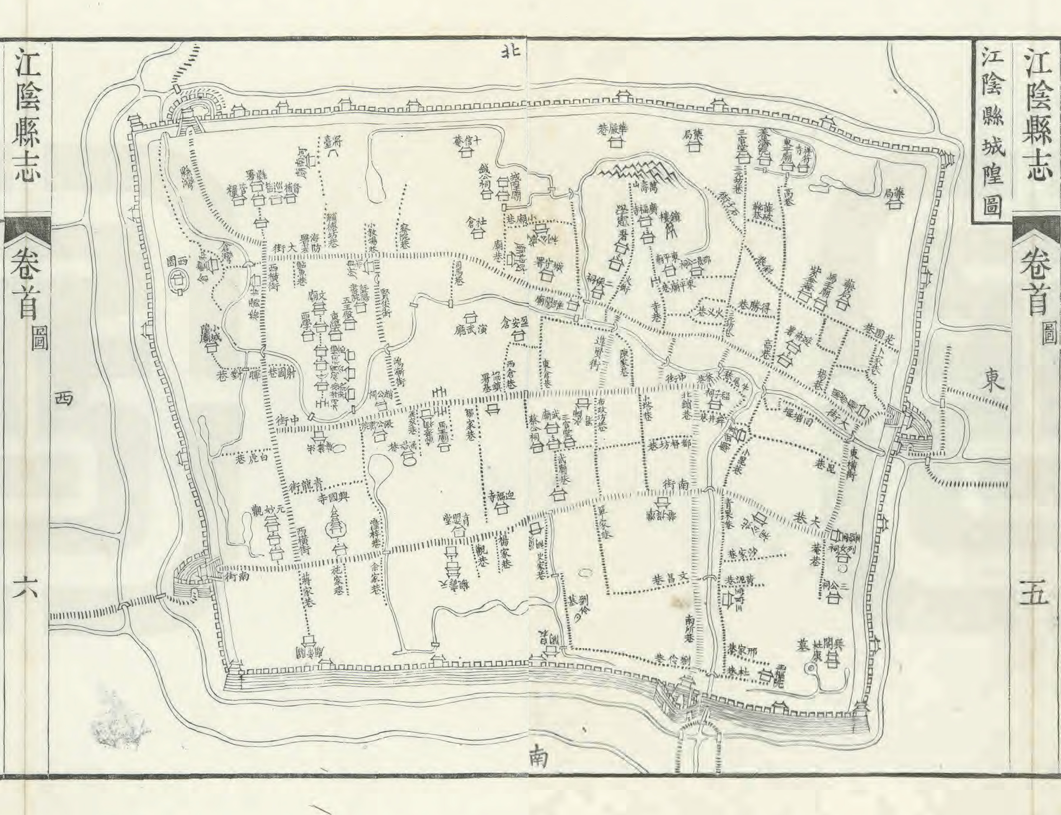 清道光二十年（1840）《江阴县志》江阴县城隍图。